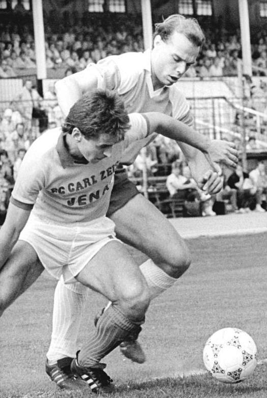 ADN-ZB-Kasper- -27.8.88-wo-Bez. Gera: Fußball-Oberliga- FC Carl Zeiss Jena - FC Hansa Rostock 2:0- Der Jenaer Spieler Heiko Weber (vorn), der den ersten Treffer für seine Mannschaft erzielte, im Zweikampf mit Frank Wriedt (FC Hansa Rostock) vor dem Rostocker Tor.